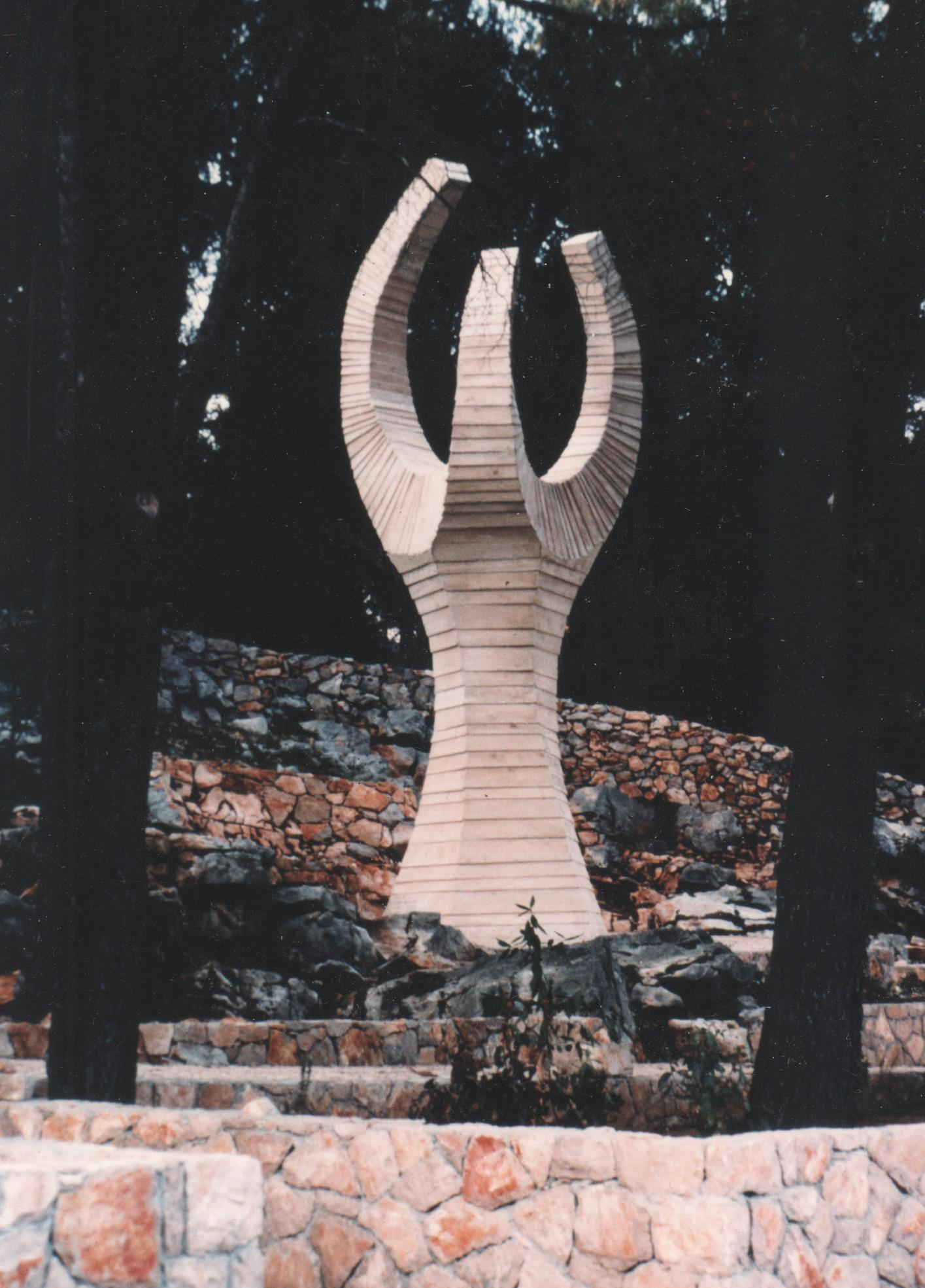 Spomenik poginulim borcima u Drugom svjetskom ratu, Svirče, otok Hvar